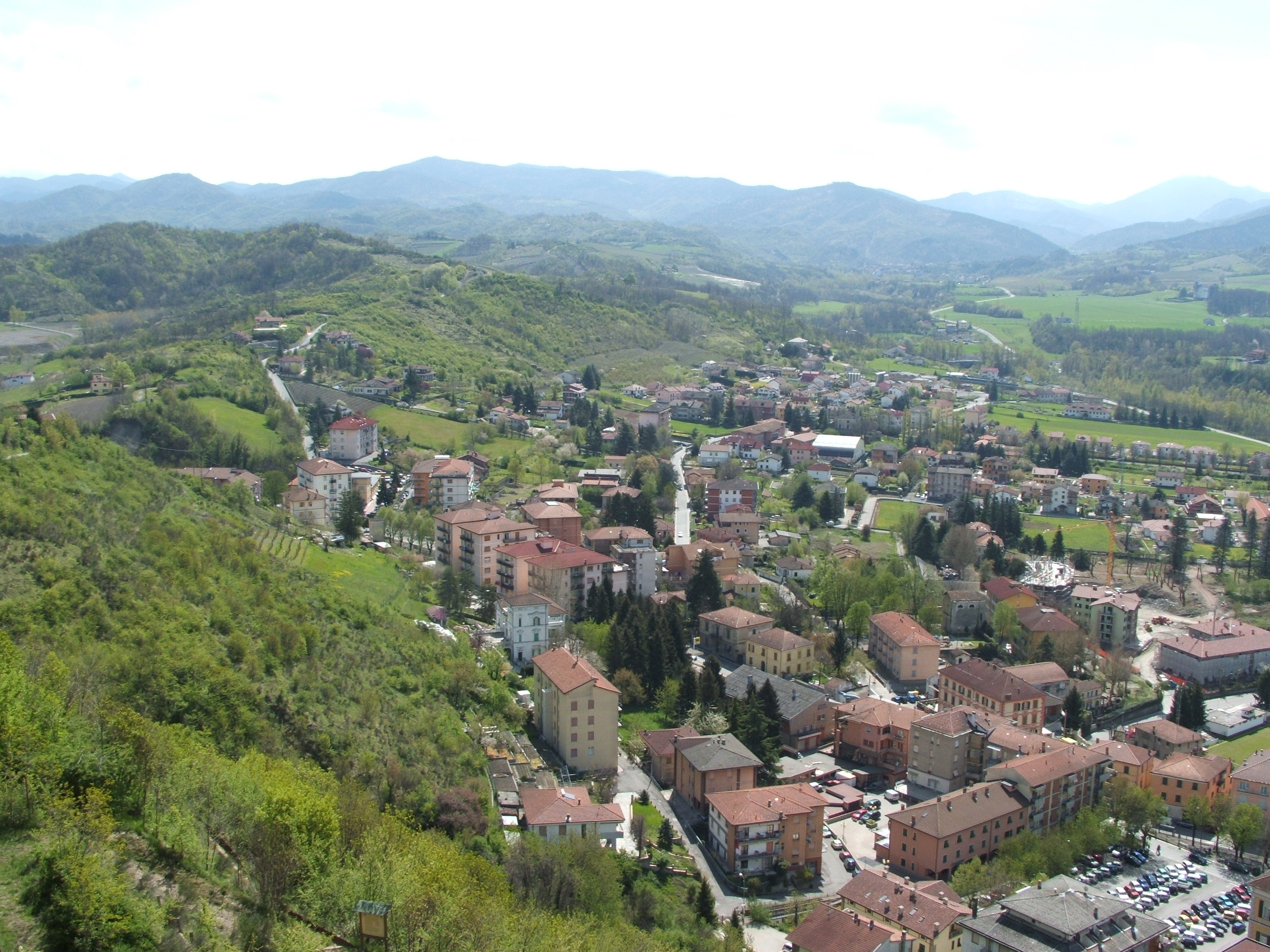 Gavi, Piemonte, Italia